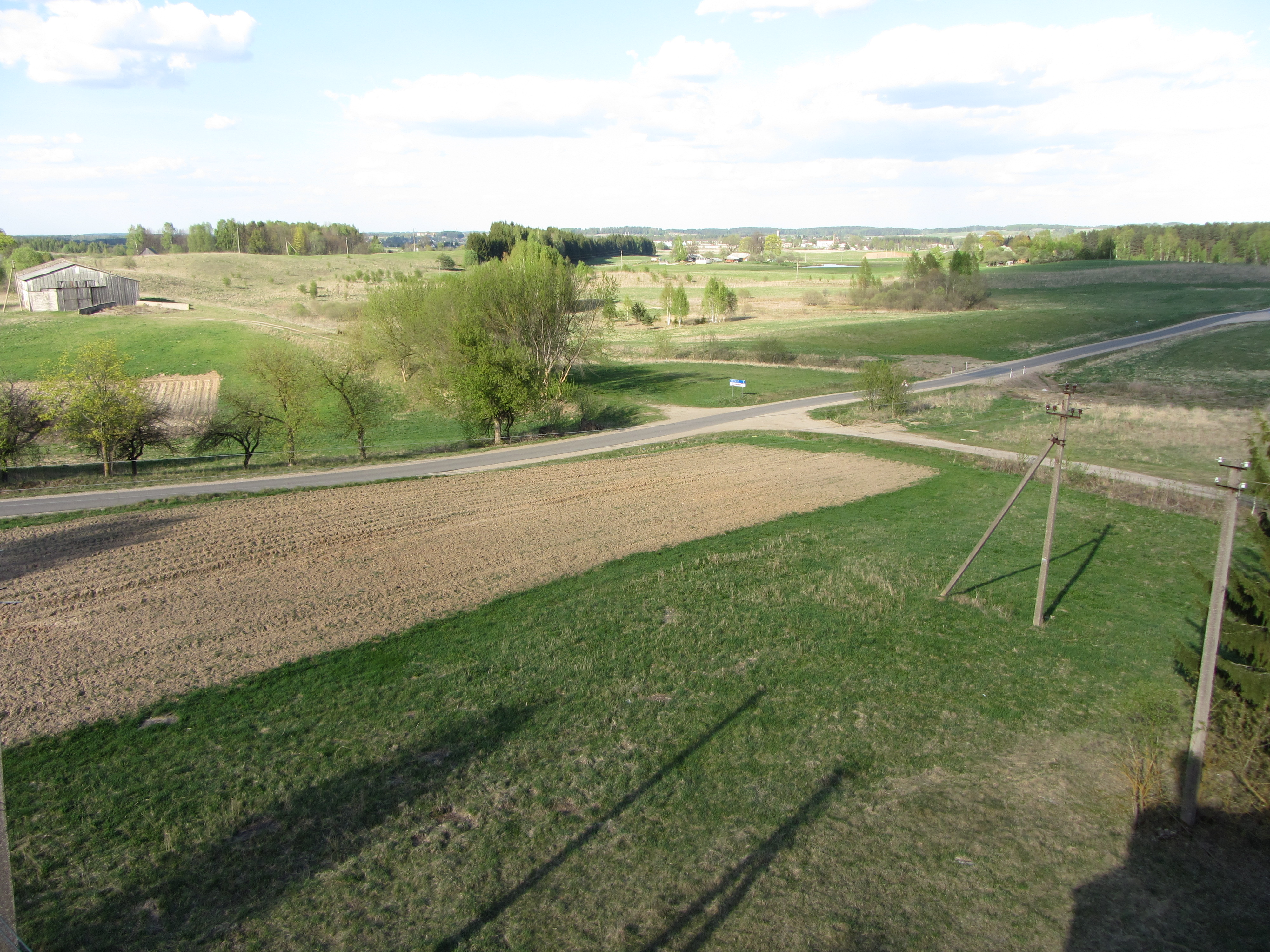 Brogiškės 32311, Lithuania